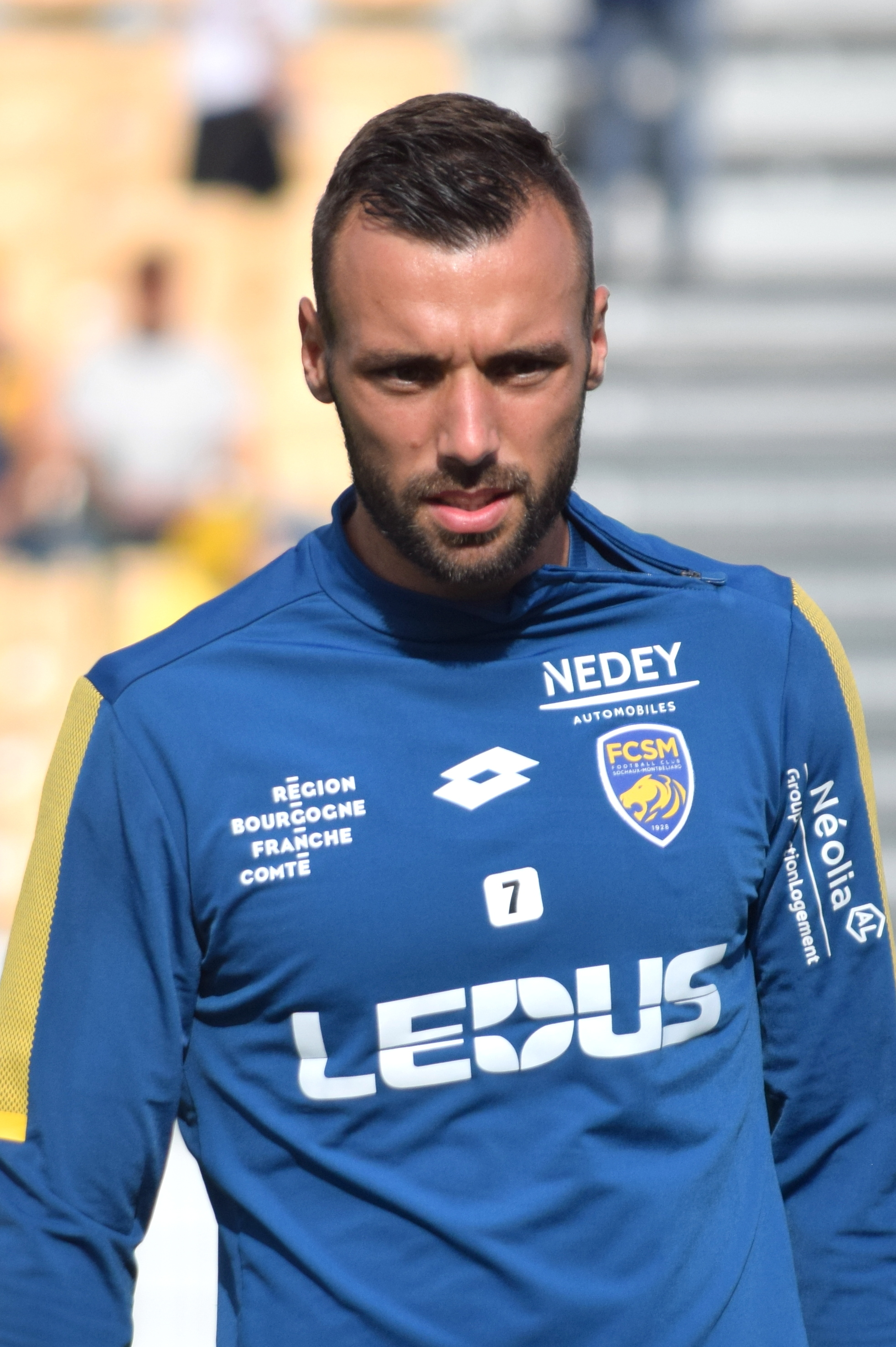 FCSM*DFCO